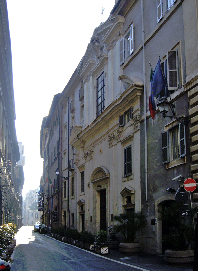 Chiesa del Santissimo Sudario, nel rione Sant'Eustachio, a Roma. Foto personale.